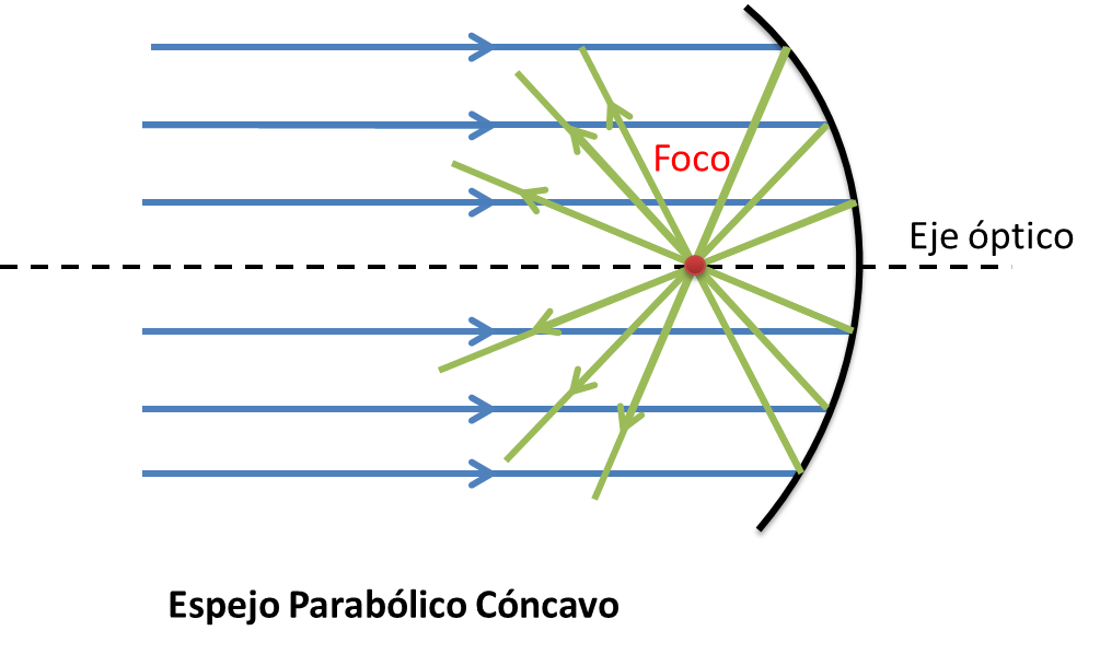 Espejo parabólico cóncavo